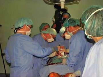 Dr. Dalladaku dhe ekipi i tij gjatë operacionit të parë në zemër të hapur në Kosovë